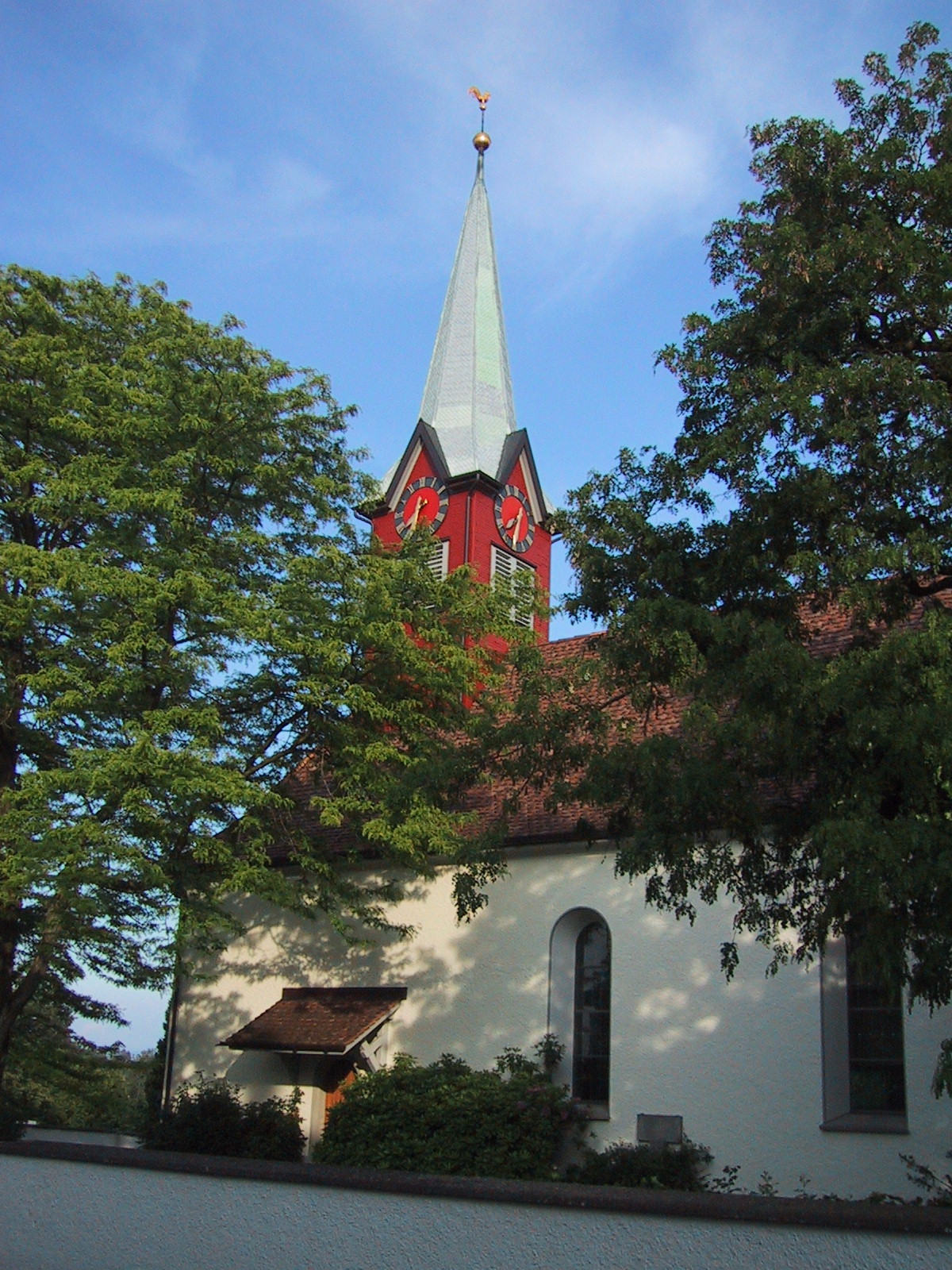 Aufnahme 15. Juni 2005, Kirche in Neukirch an der Thur TG. Fotograf Peter Berger (selbst fotografiert). Lizenzstatus "GNU-FDL"